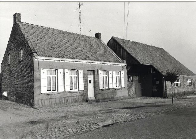 Tessenderlo Baalmolenstraat 44